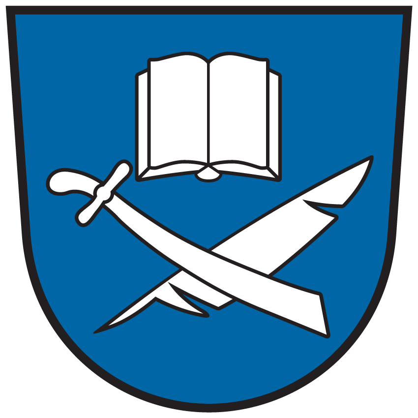 Wappen von Techelsberg am Wörthersee